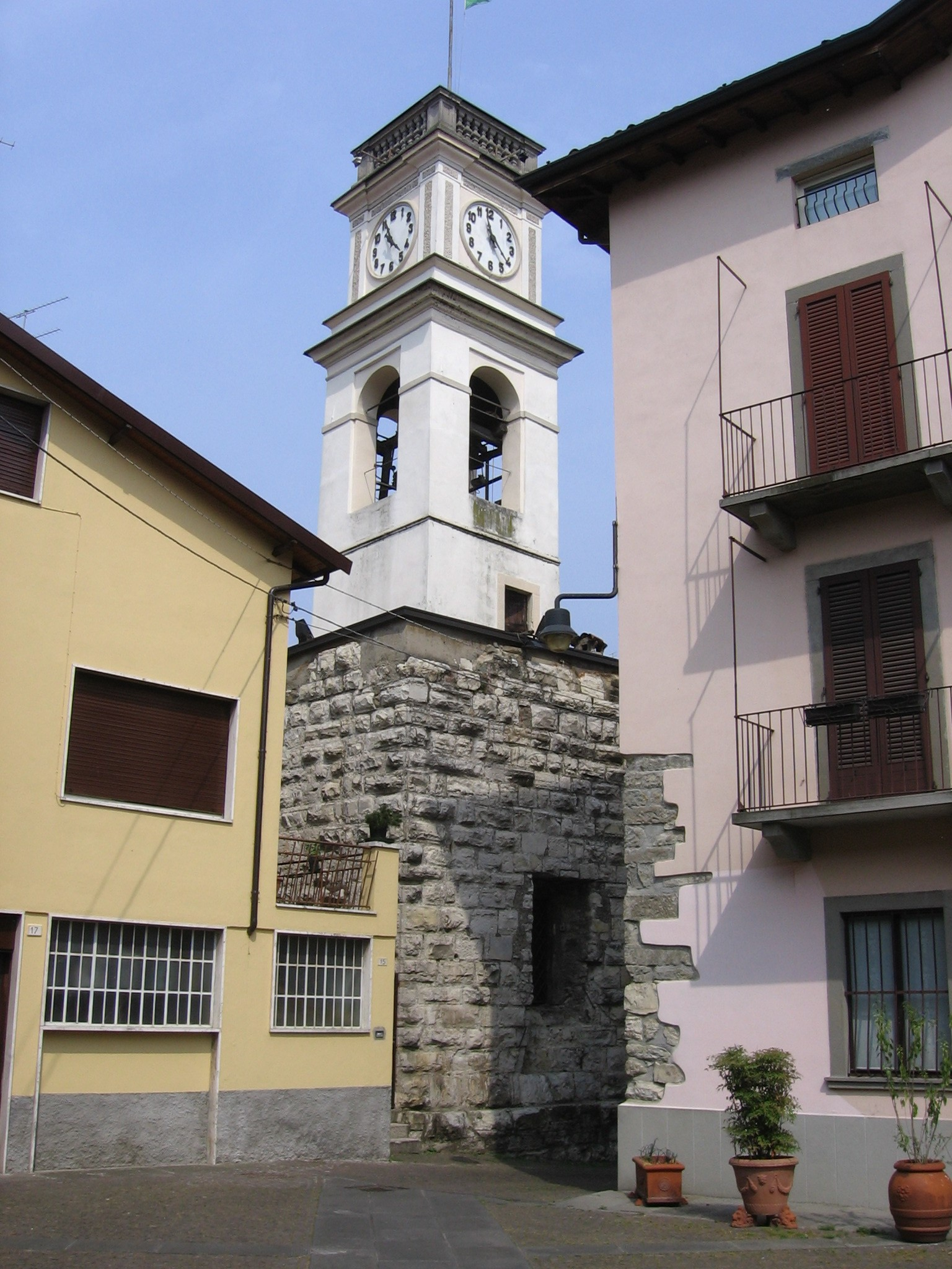 Centro storico, Sarnico, Bergamo, Italia